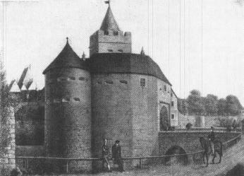 Das Salztor in Naumburg um 1800